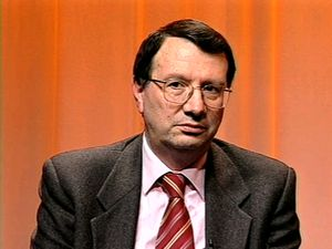 Gabriele Parenti, al convegno a Firenze su Giorgio La Pira